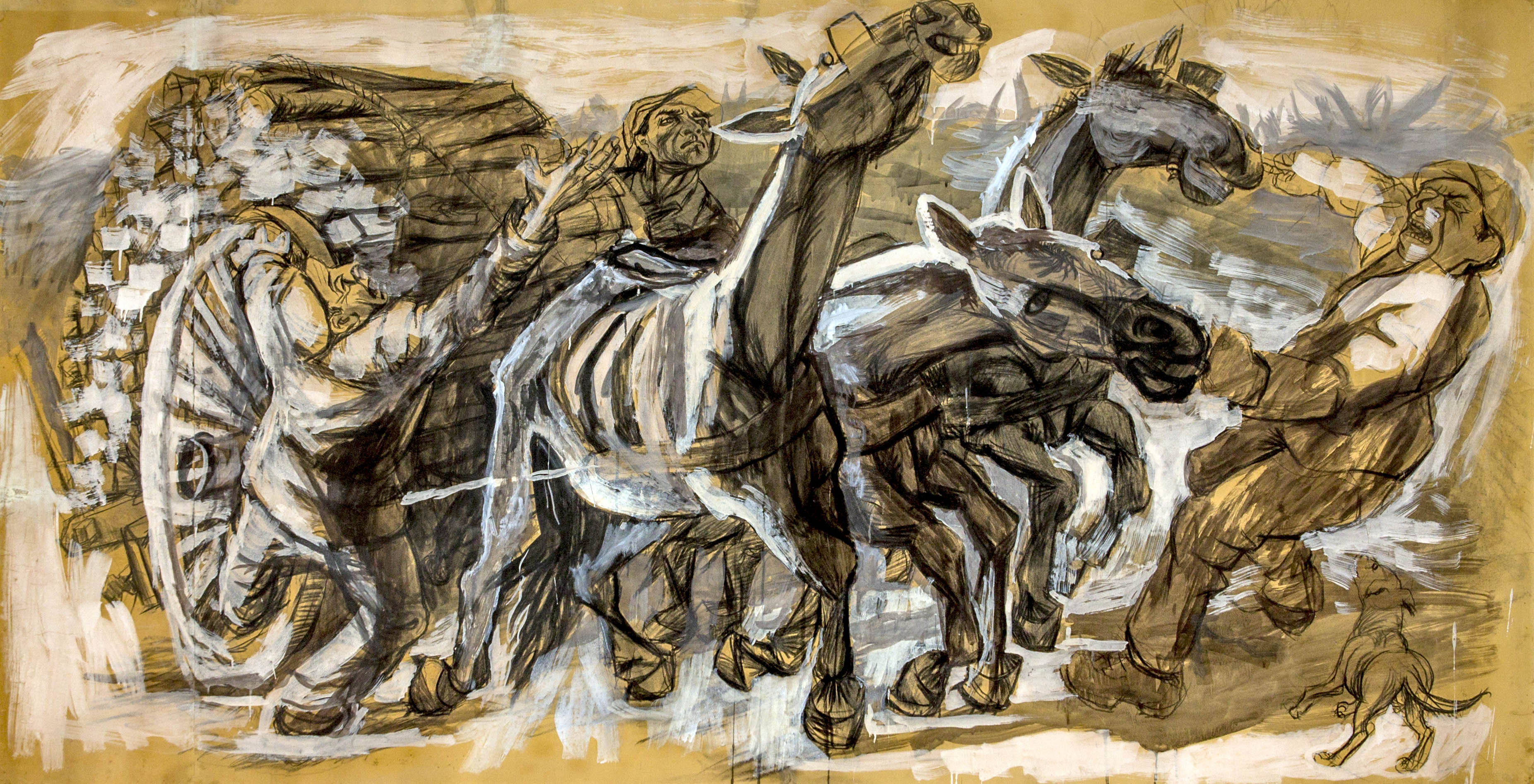 Tecnica mista su carta, grande formato. Custodito presso la sala consiliare della Provincia dell'Aquila.